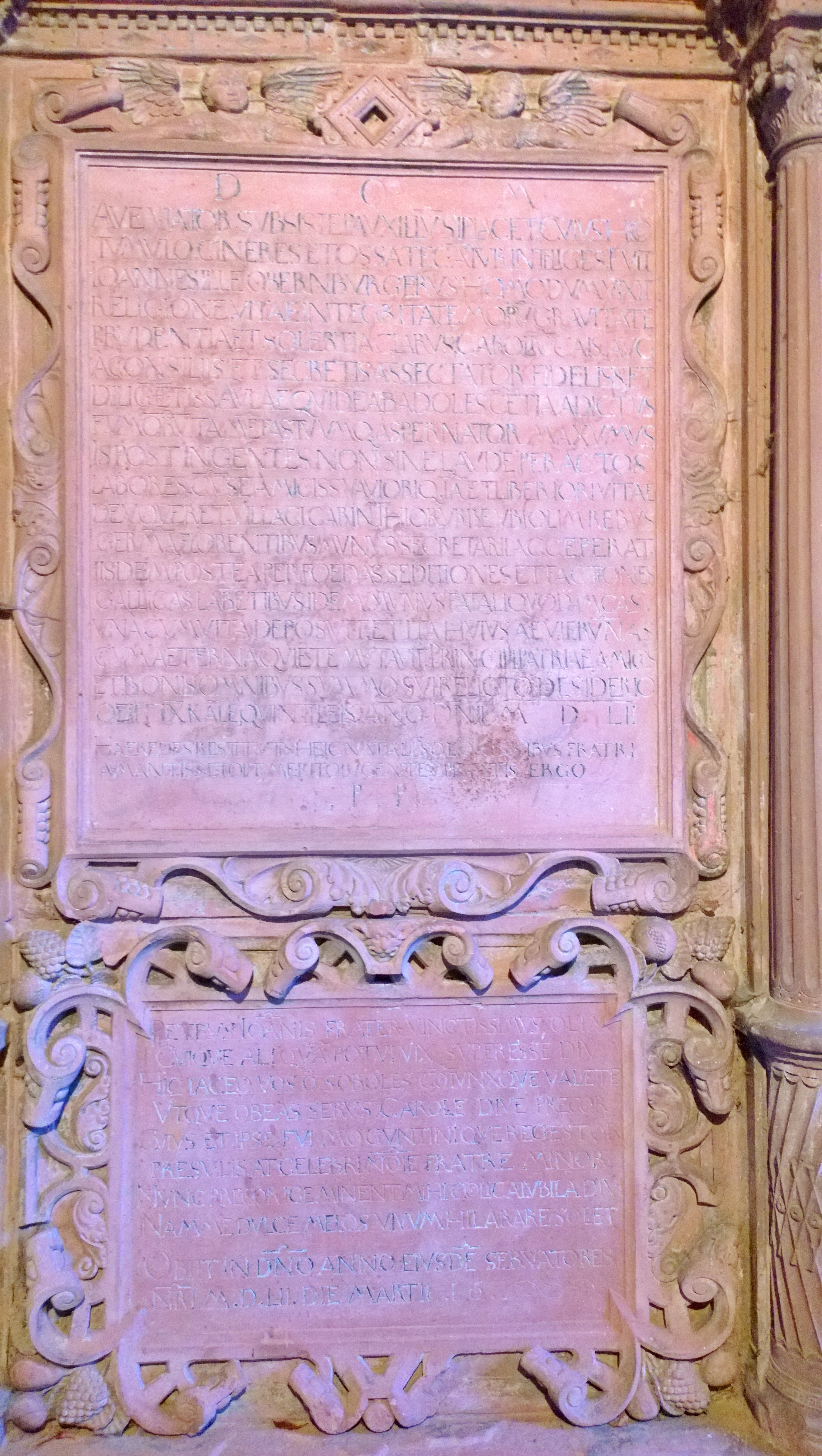 Lateinische Inschriften am Epitaph der Gebrüder Obernburger, oben für Johannes - unten für Peter Obernburger